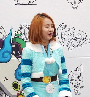 한국닌텐도 '닌텐도3DS 요괴워치 페스티벌' 현장 (NC.A)